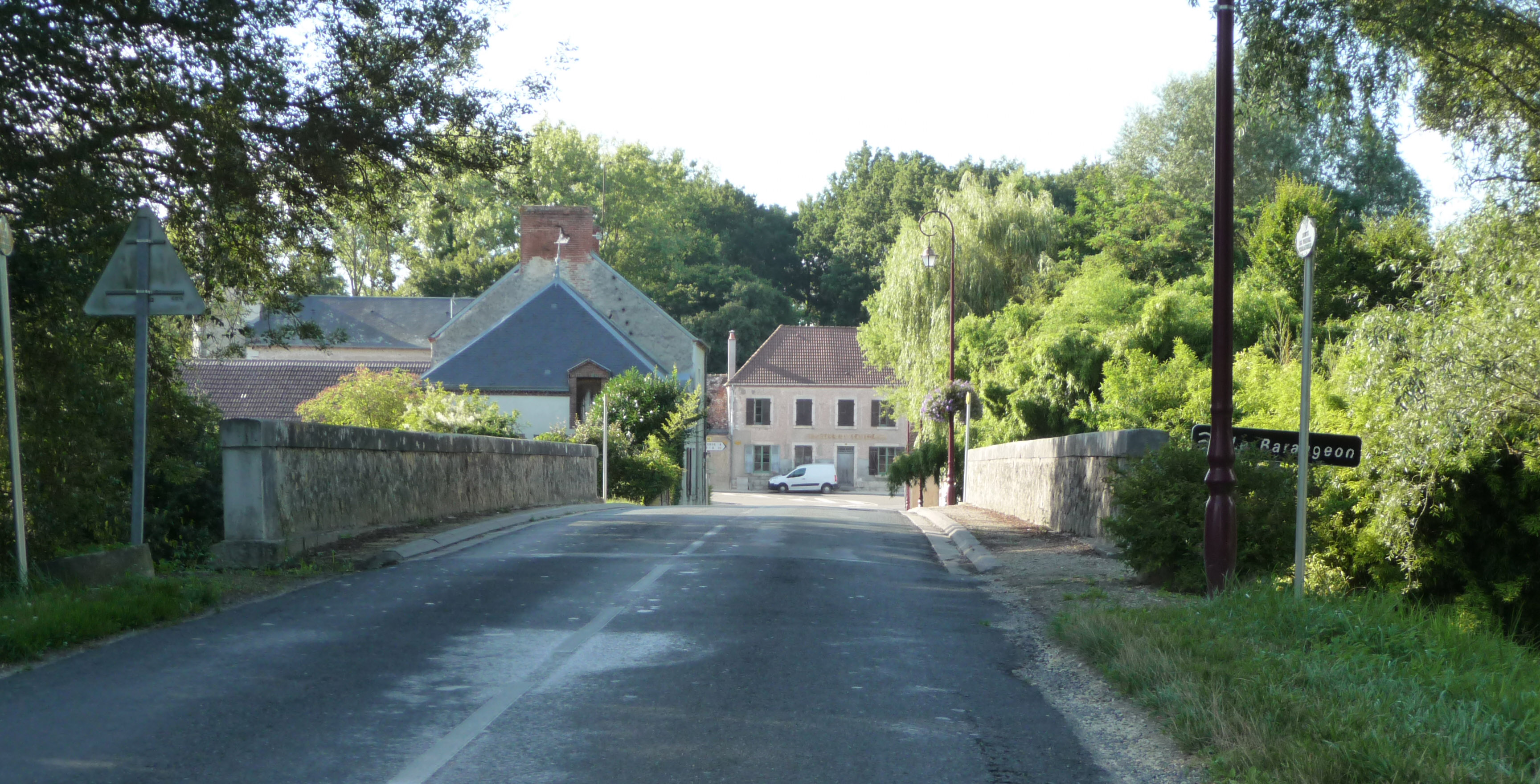 Photo de l'entrée du Village de Saint-Laurant dans le Cher en 2013